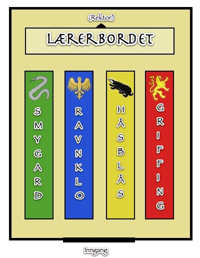 Norsk oversikt over bordene i storsalen på Galtvort høyere skole for hekseri og trolldom